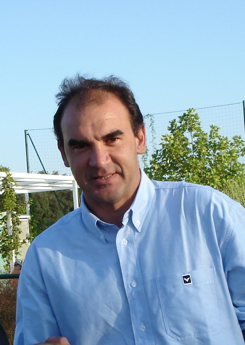 Raymundo Ricardo Gomes entraîneur des Girondins de Bordeaux